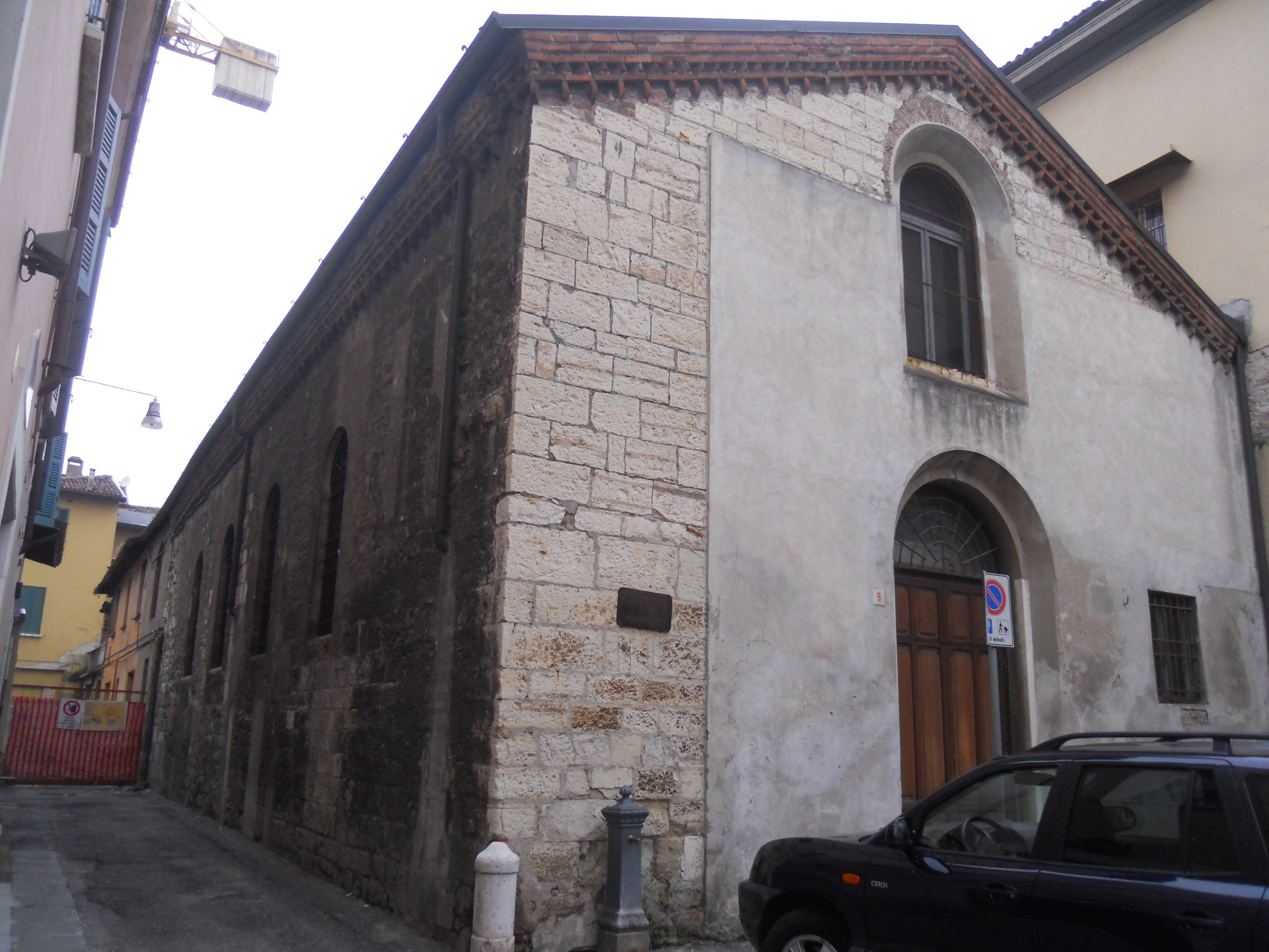 chiesa di san mattia alle grazie (brescia) fianco